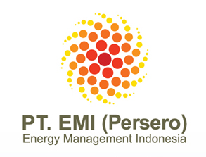 Logo PT. Energy Management Indonesia (Persero)